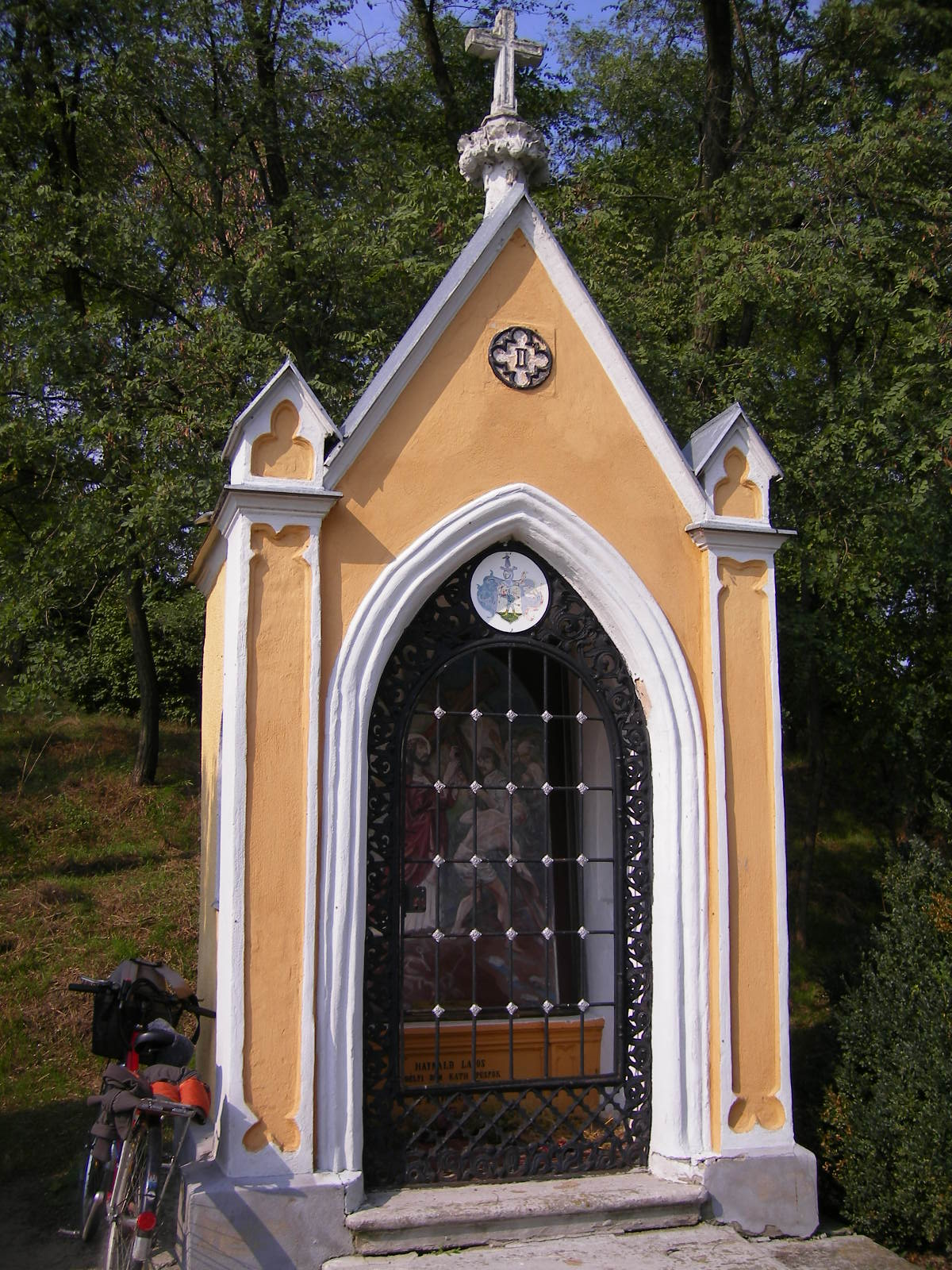 Udvard - Kálvária (2. stáció)